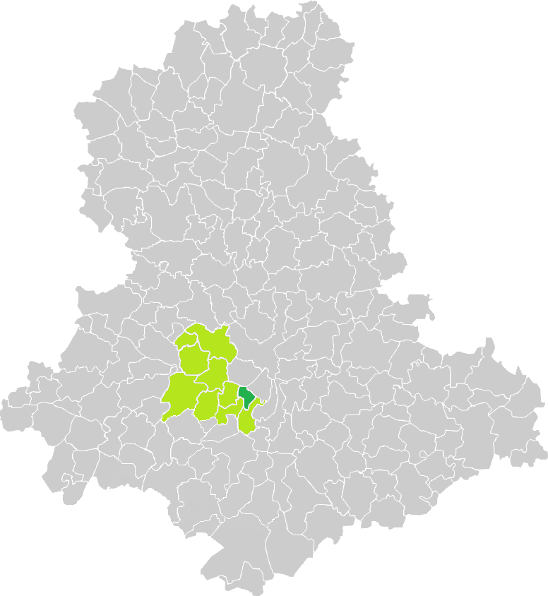 Carte de situation de la commune de Bosmie-l'Aiguille (en vert foncé) dans le votre Canton (en vert clair) sur une carte des communes de la Haute-Vienne